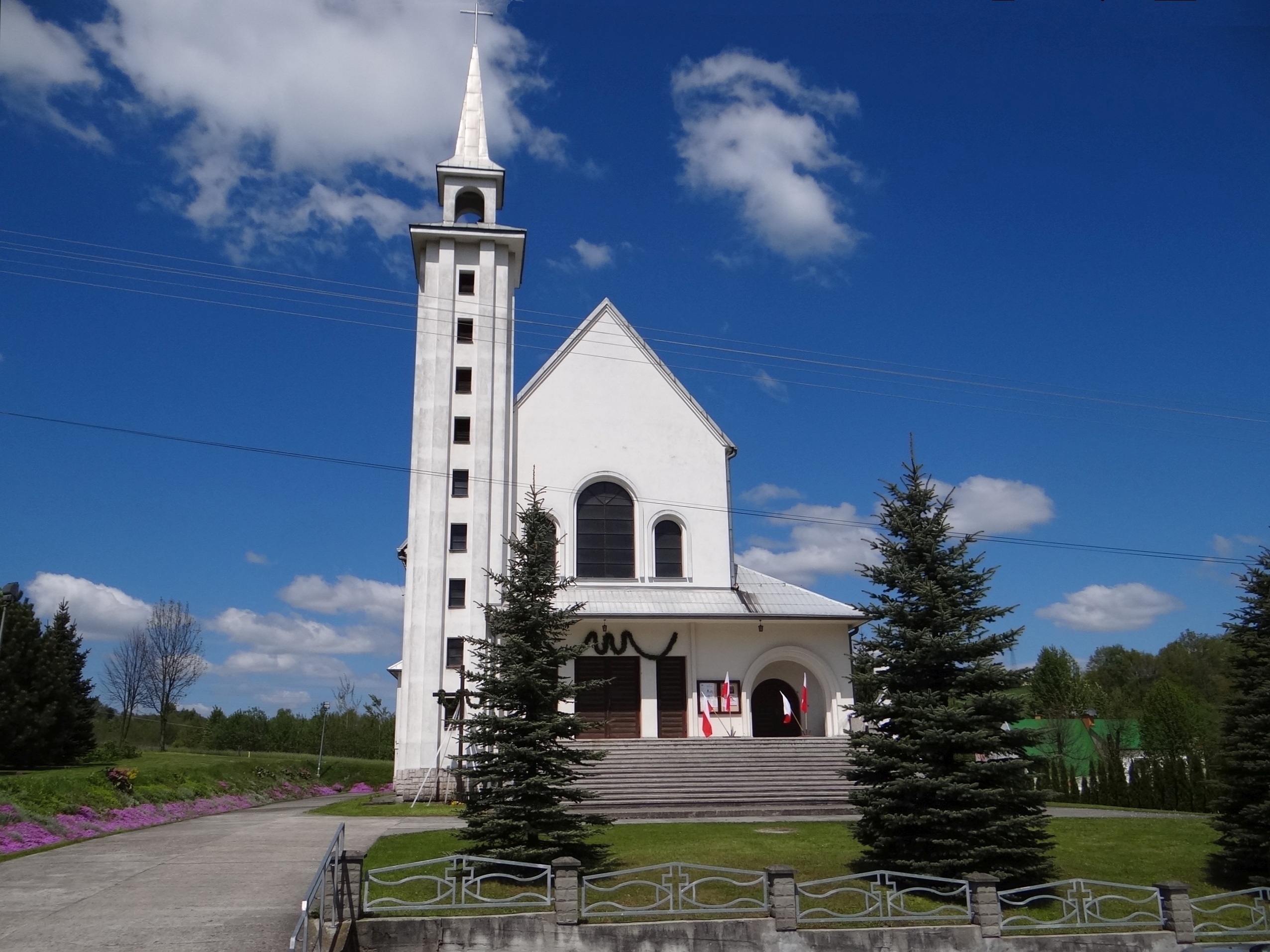 Kościół w Buchcicach